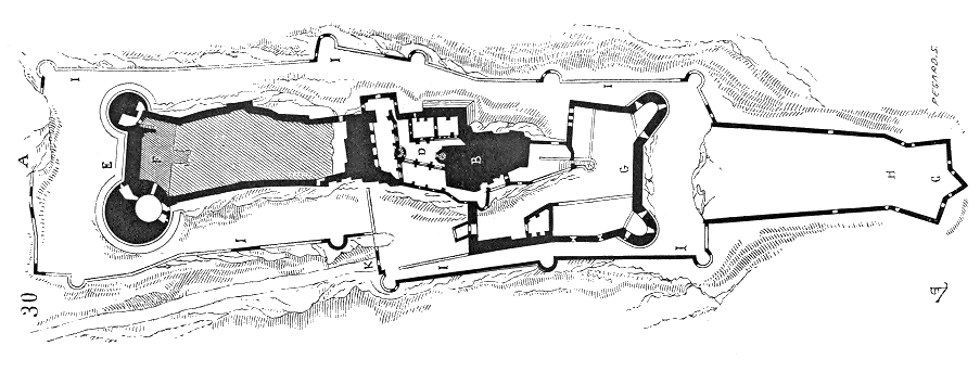 Hoh-Koenigsbourg, Grundriss